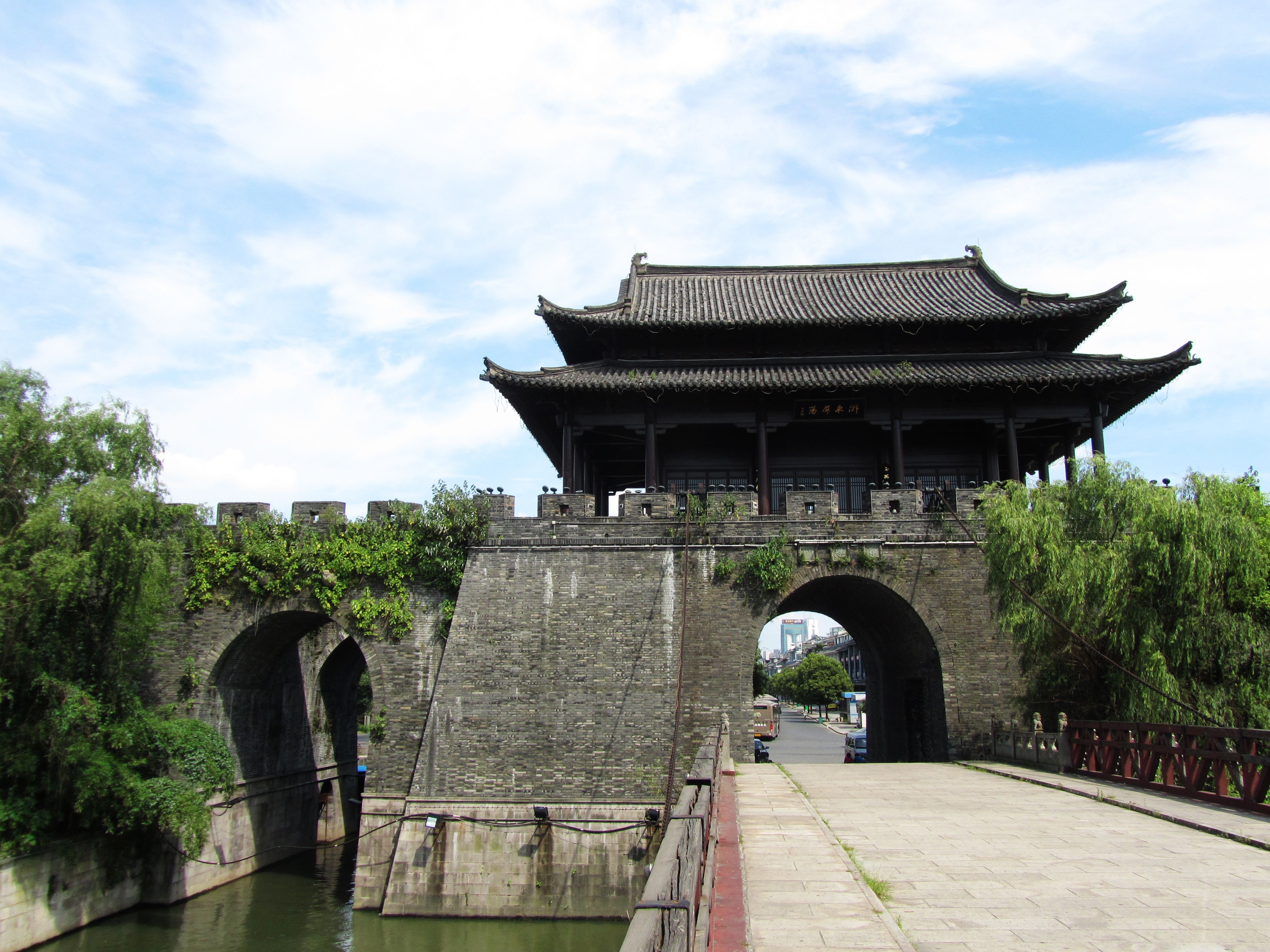 绍兴迎恩门，自西侧望城门和水门。